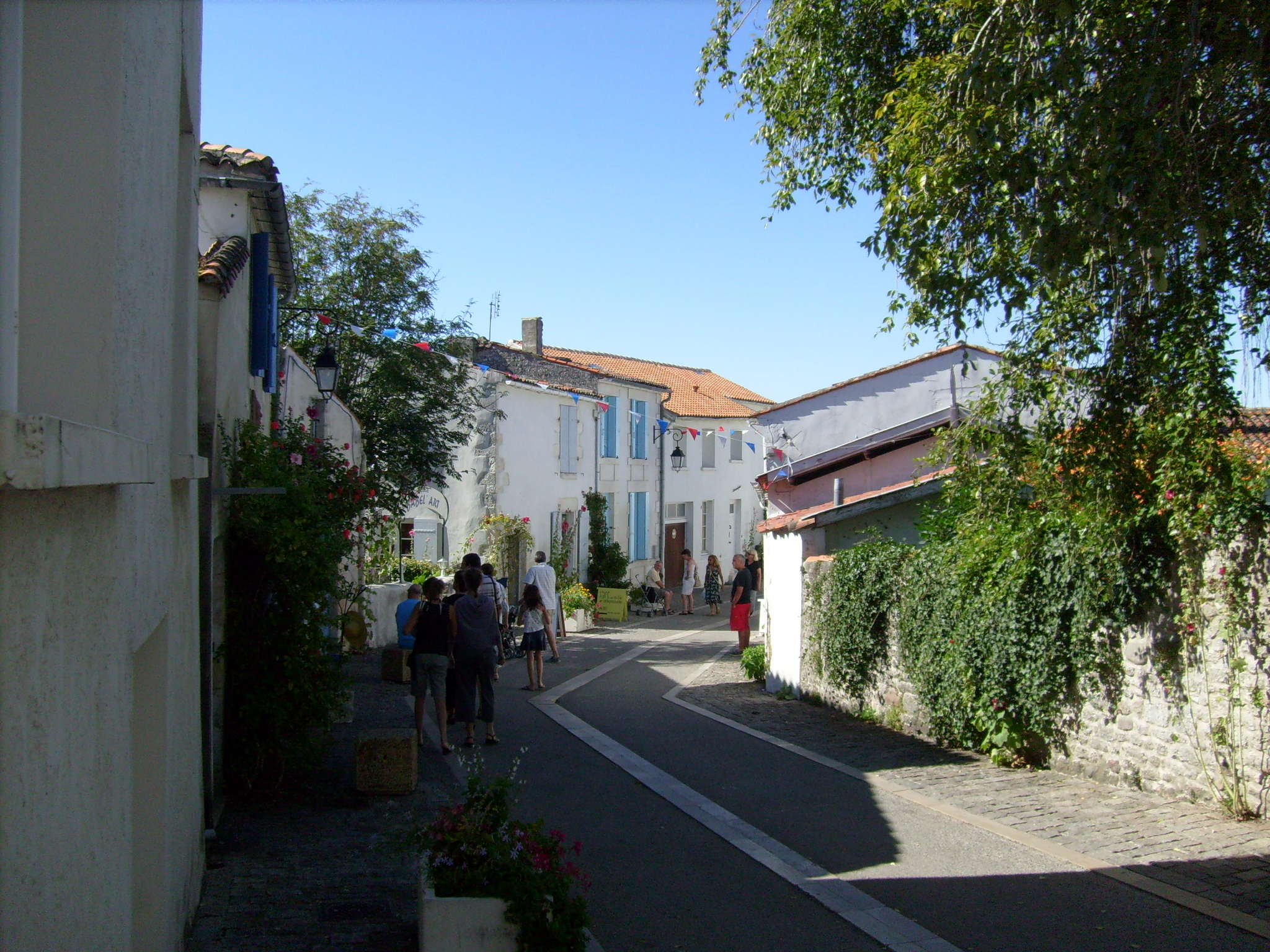 Ruelles du village médiéval de Mornac sur Seudre